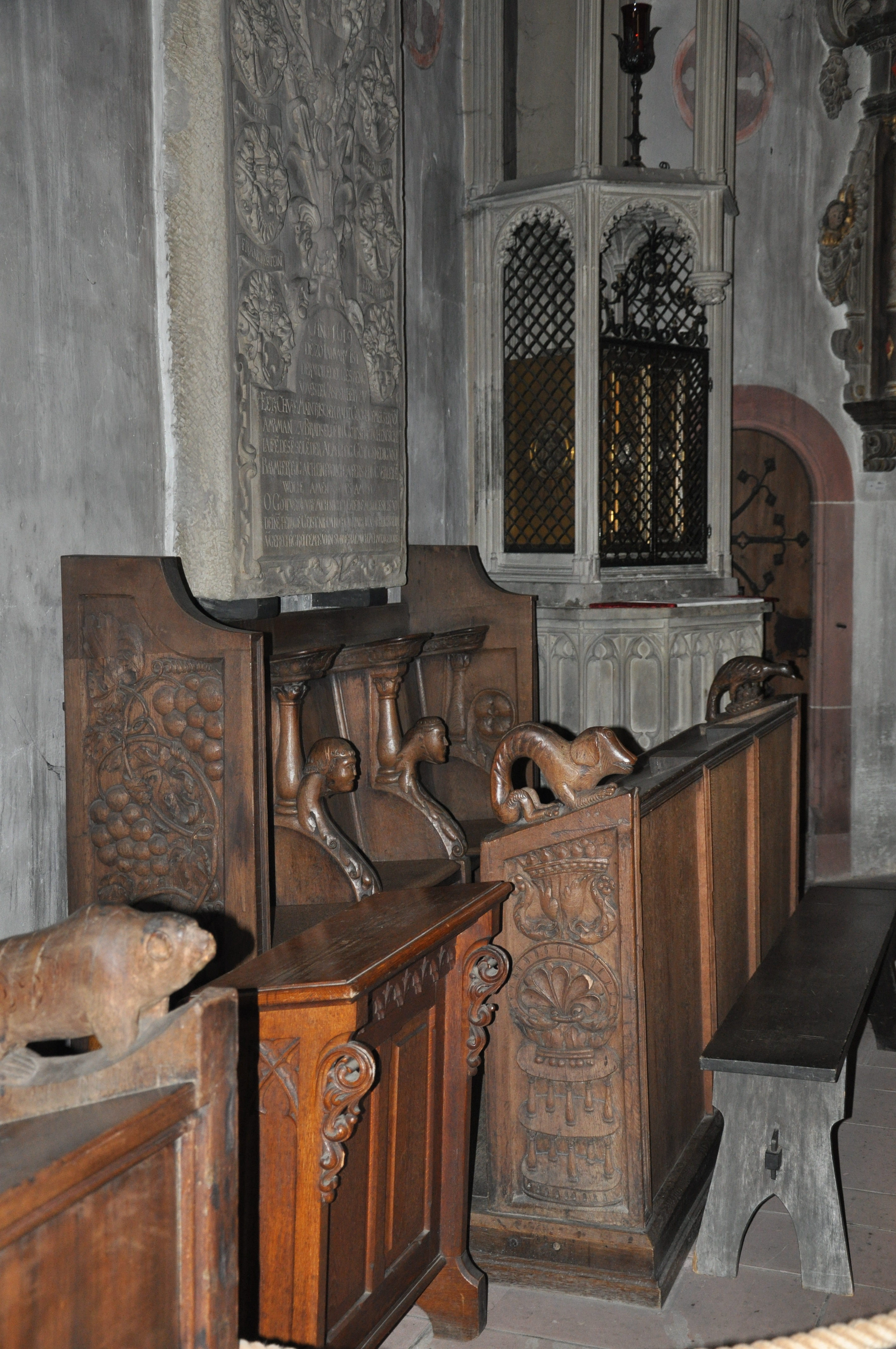 Kiedrich, Pfarrkirche St. Valentin, Chorgestühl